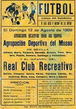 Cartel anunciador de partido de fútbol en Huelva.